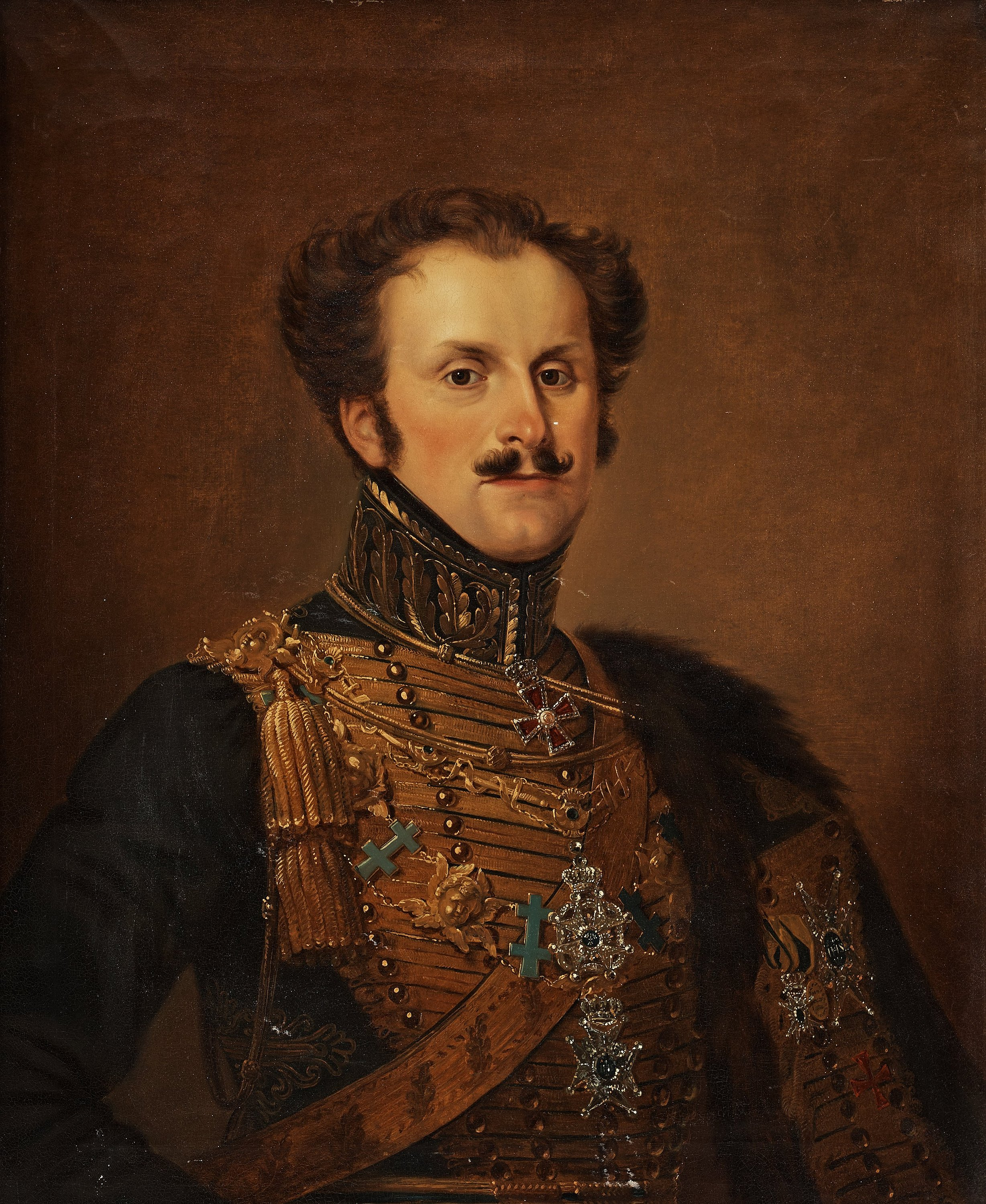 Porträtt av Greve Magnus Brahe (1790-1844) från 1831 av Olof Södermark. Porträttet liknar ett som finns i Skokloster samlingar. Brahe bär på bilden troligen uniform för Konungens adjutants- och ordonnansofficerskår. Brahe bär dessutom Serafimerordens samt Svärdsordens kedjor över axlarna, vilkas ordenstecken är briljanterade. Runt halsen syns Carl XIII:s orden. På dolman syns Serafimerordens briljanterade kraschan, samt även ett briljanterat riddartecken för Svärdsorden, mellan dessa båda syns medaljen För tapperhet i fält i guld.